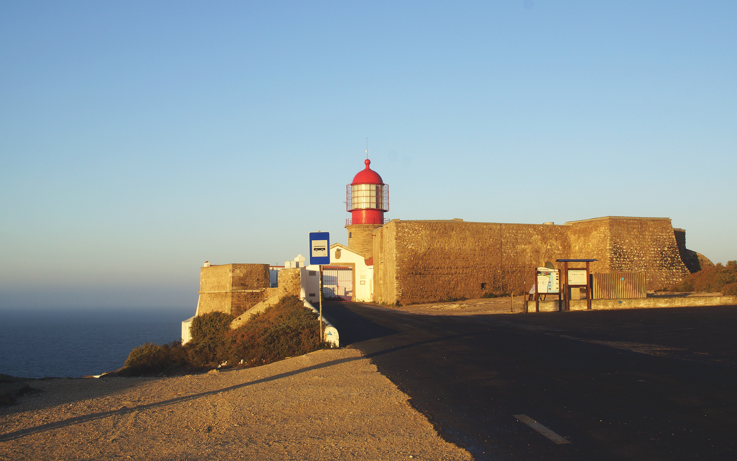 Leuchtturm am Cabo de São Vicente in der Algarve, zugleich südwestlichster Punkt des europäischen Festlands in Portugal. Foto Wolfgang Pehlemann DSC00615